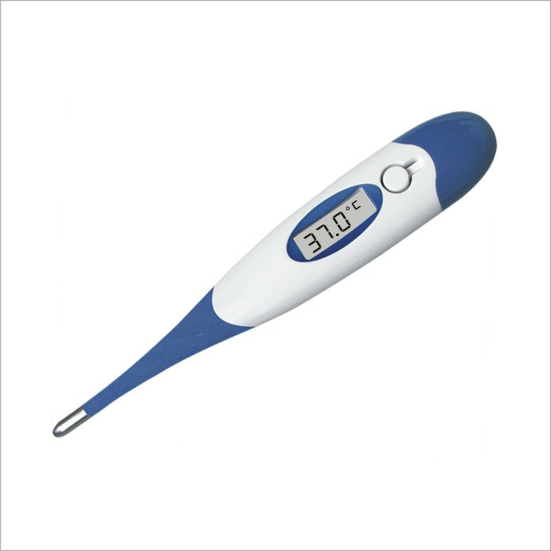 ე–თერმომეტრი